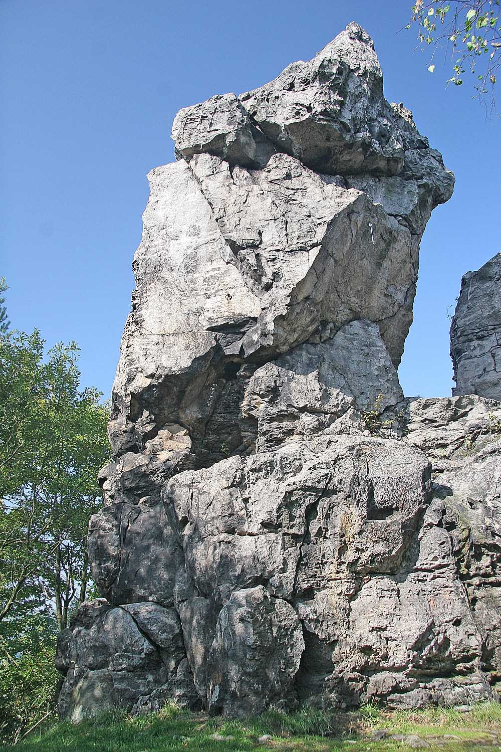 Krkavčí kameny v Lužických horách autor:Zp date:21. 9. 2006